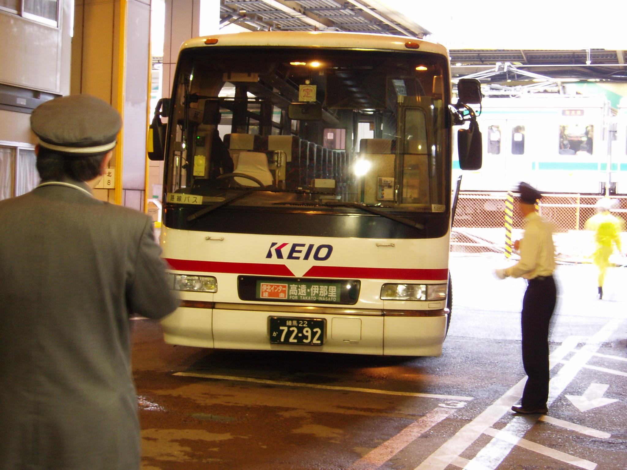 Keio Dentetsu Bus K69808 "Minami Alps" Hino KC-RU3FSCB at Shinjuku Highway Bus Terminal